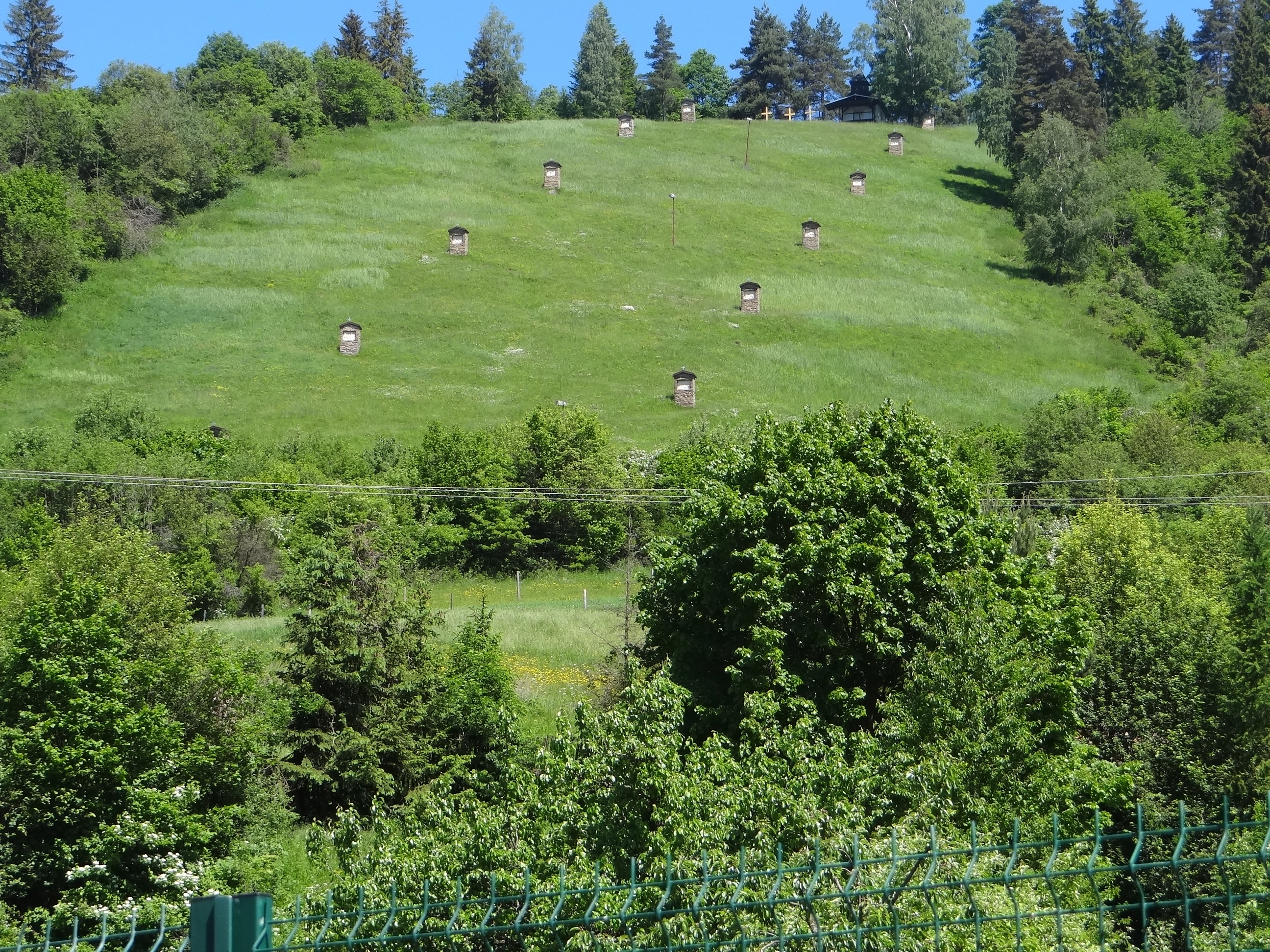 Kolačkov